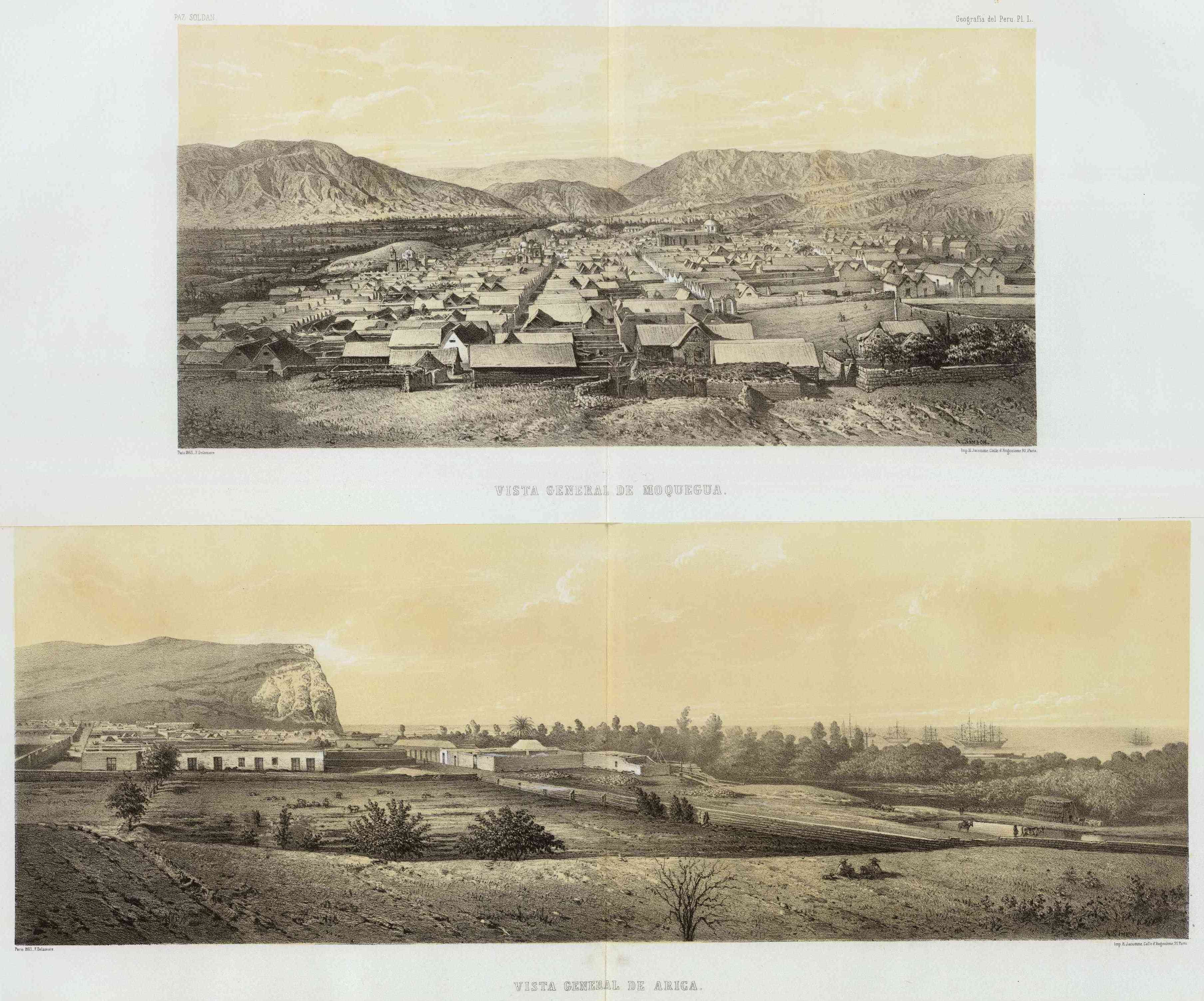 Vista general de Moquegua. Vista general de Arica. A. Simeon (artist). Paz Soldan. Geografia del Peru. Paris, 1863, F. Delamare. Imp. H. Jacomme, Calle d'Angouleme, 92, Paris. (Paris: Libreria de Augusto Durand, 1865)